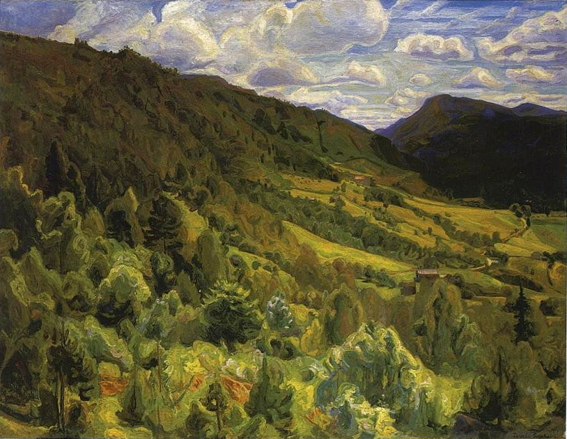 From Kvitseid.label QS:Len,"From Kvitseid."